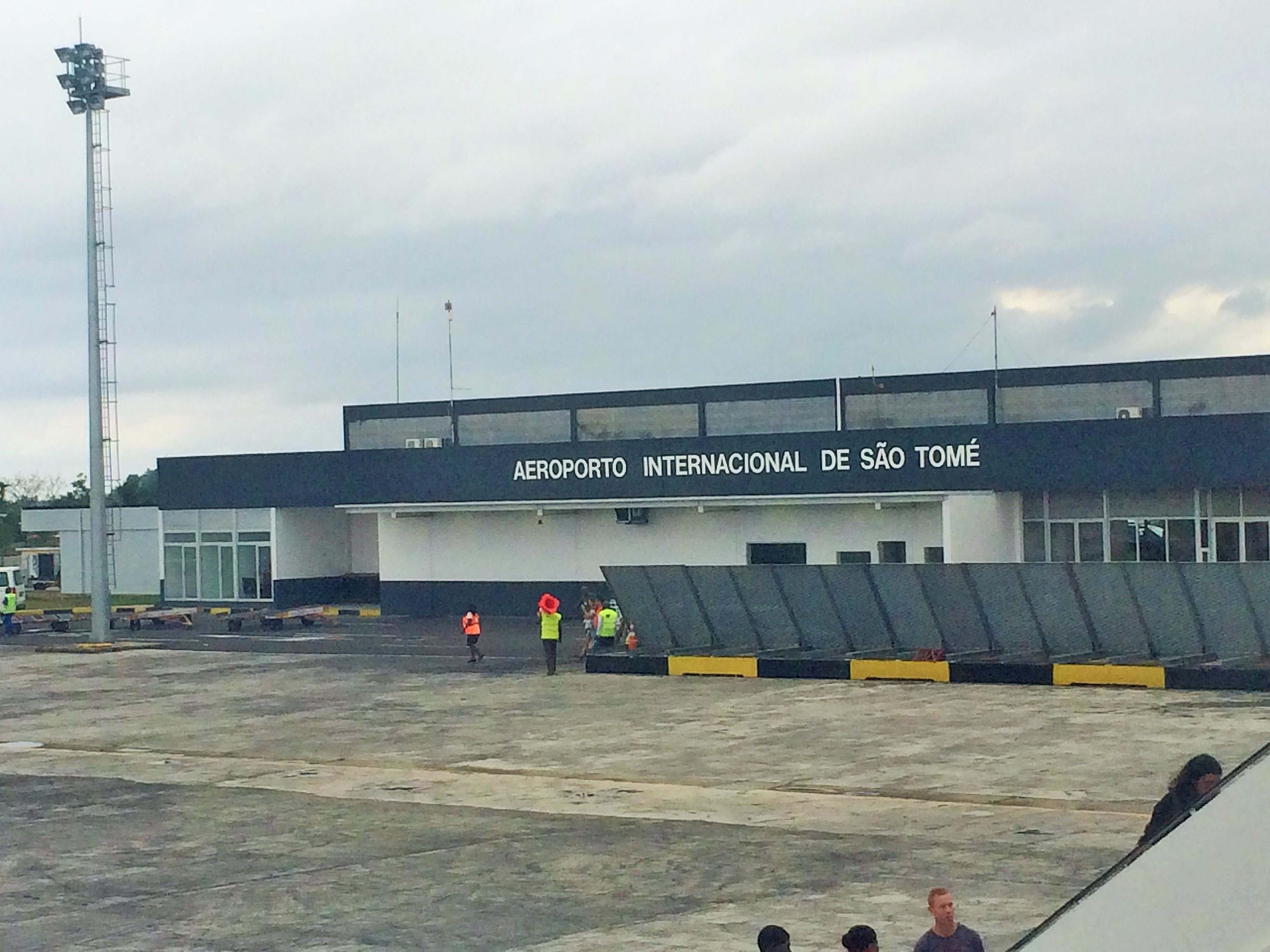 Sao Tome Airport